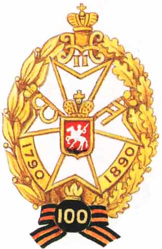 Badge of Moskovsky 8-th grenader Regiment